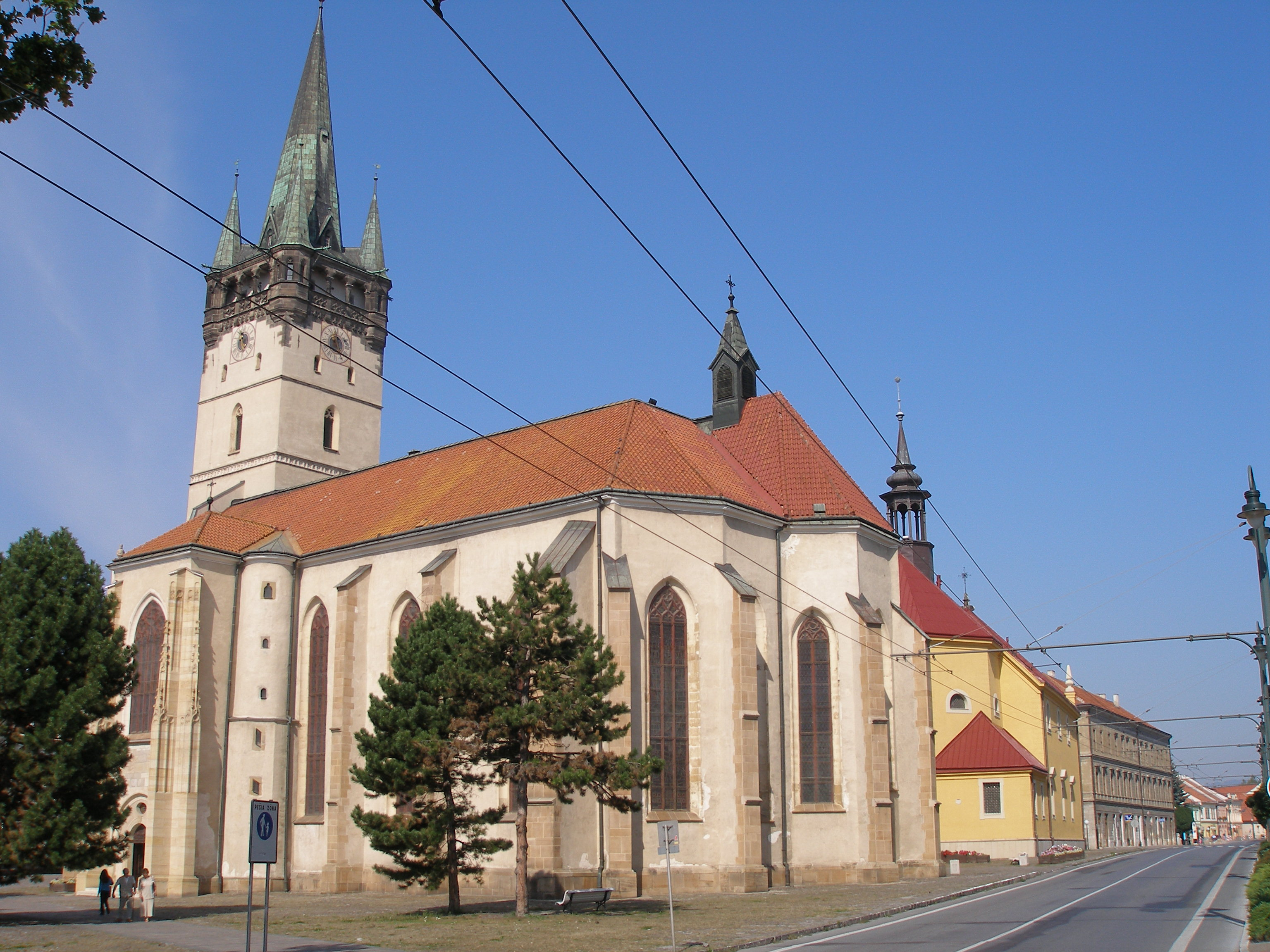 Prešov, rímskokatolícka neskorogotická Konkatedrála Dómu sv.Mikuláša v Prešove. Región Šariš. Chrám začali stavať po roku 1347 na mieste staršej sakrálnej stavby.Vežu kostola dokončili v roku 1515. V interiéri kostola sú plastiky rezbára Majstra Pavla z Levoče. V rokoch 1981 až 1989 prebiehala celková obnova chrámu s nákladom 15 848 087 korún československých. Kostol je dominantou mesta a stojí na Hlavnej ulici.Rozmery kostola dĺžka 54,7 metra,šírka 34 až 45 metrov, vnútorná výška lode bez veže je 16 metrov a výška s vežou je 71 metrov. V letnej sezóne je možný výstup na vežu kostola po 200 schodoch do výšky 60 metrov. V pozadí evanjelický Chrám Svätej Trojice a stará budova evanjelického kolégia.